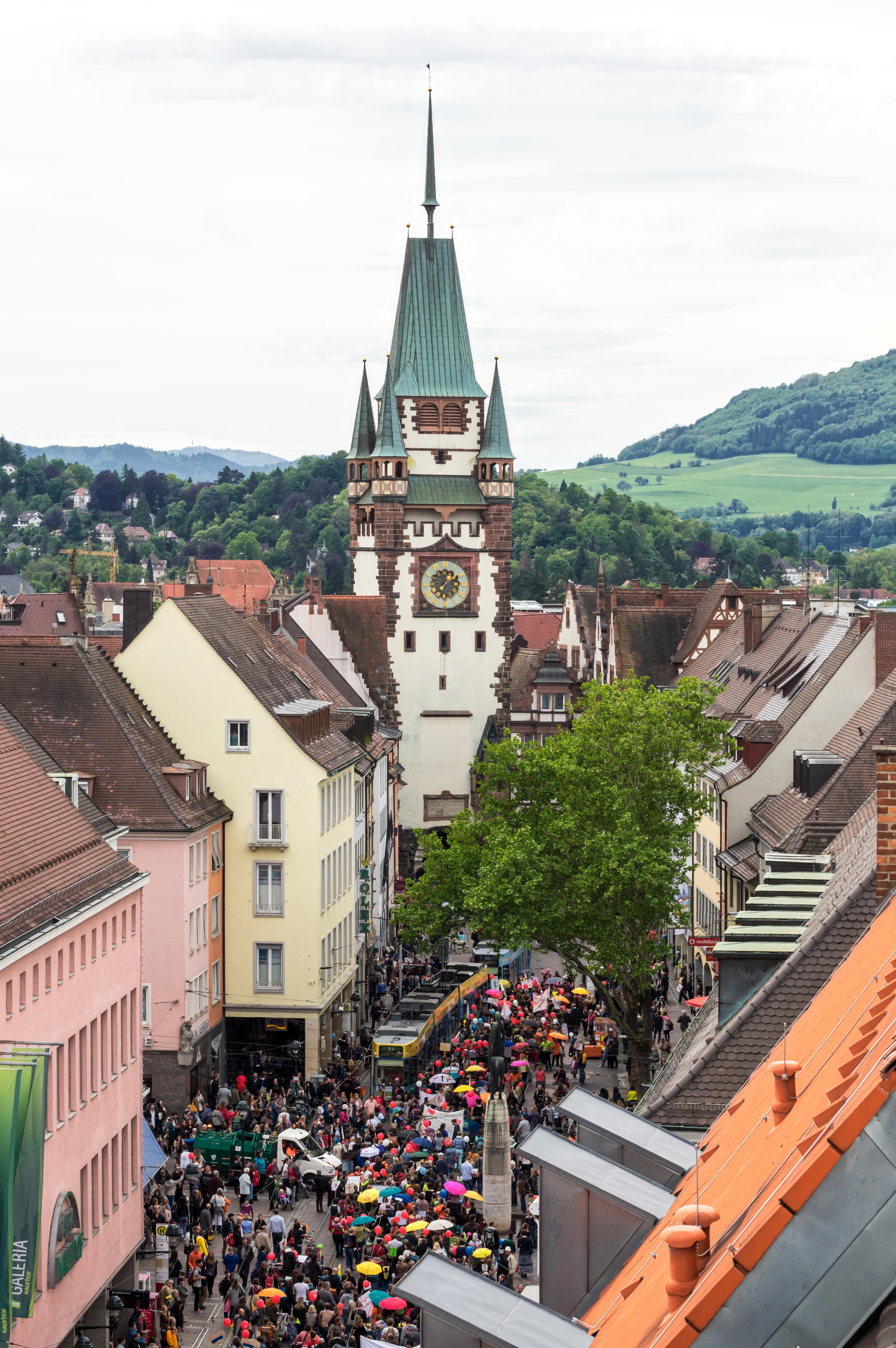 Bilder aus Freiburg im Breisgau Blick über Freiburg Blick zum Martinstor, mit der Hebammendemonstration